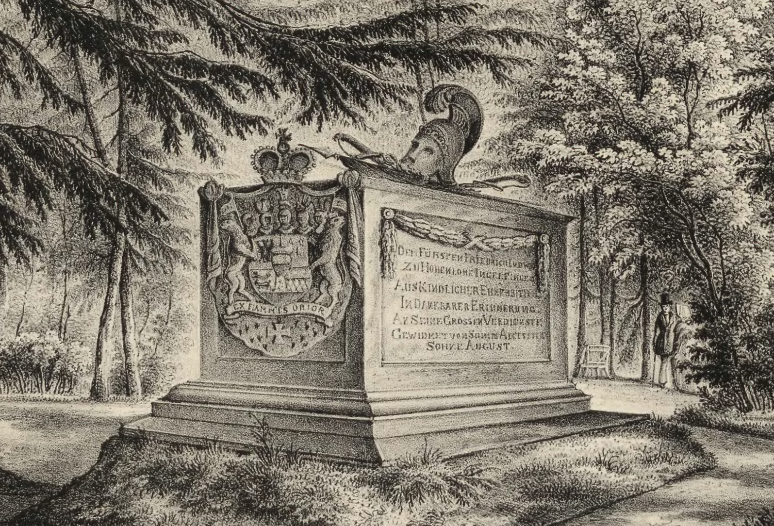 Das Fürstliche Grabmal in Slawentzitz (Schlawentzitz). Grabmal Friedrich Ludwigs zu Hohenlohe-Ingelfingen.